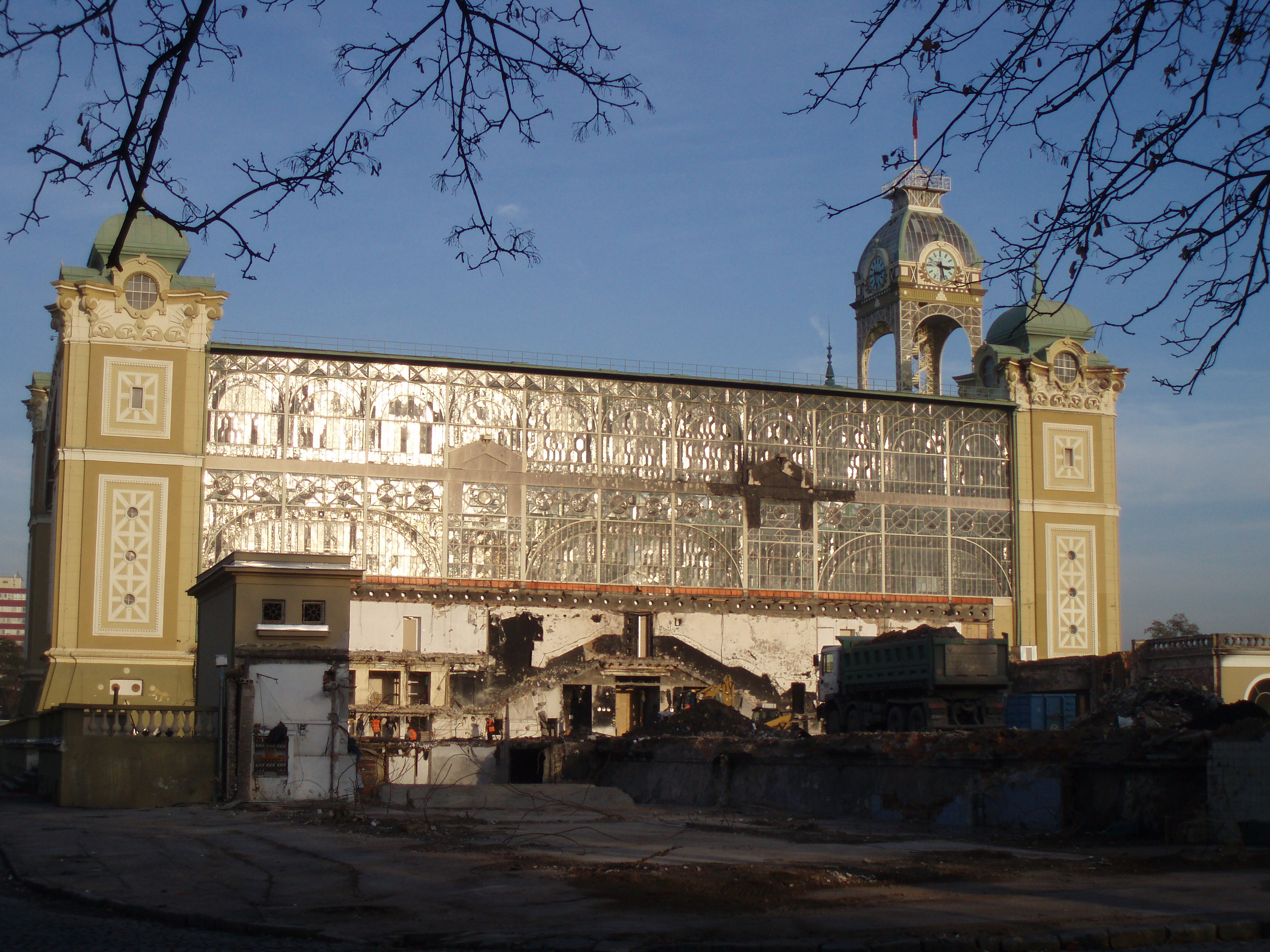 Výstaviště Praha, Praha 7-Bubeneč, Výstaviště, Bubeneč.